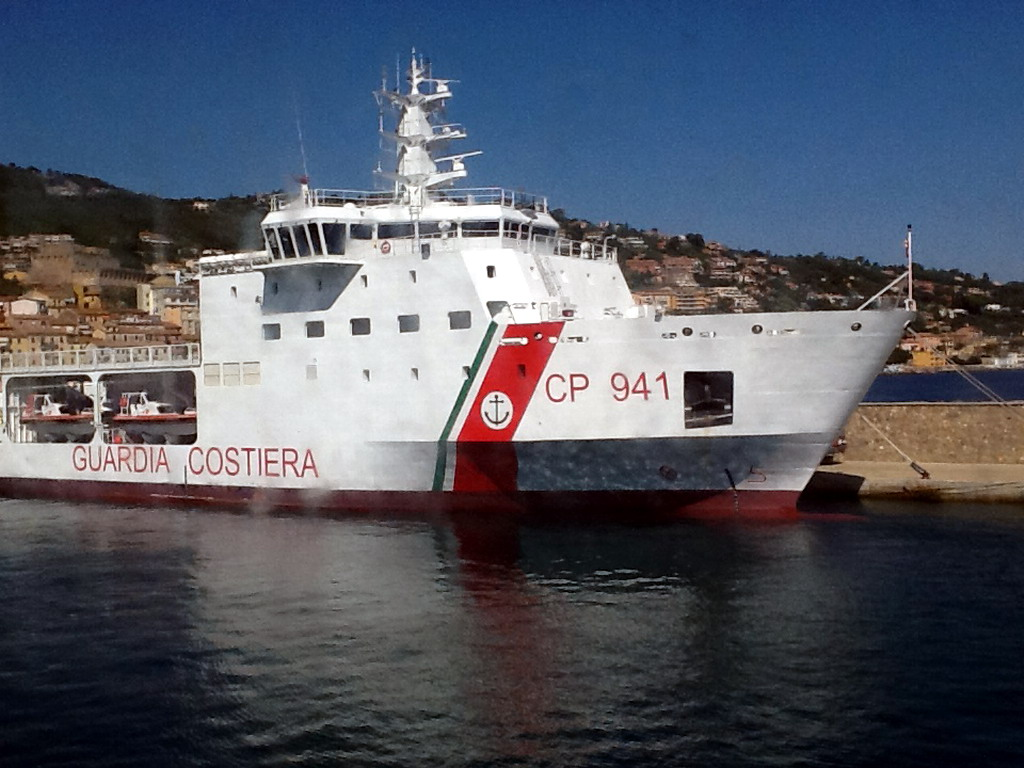 Il pattugliatore Diciotti della Guardia Costiera all'isola del Giglio durante le prime fasi delle operazioni di rigalleggiamento della nave da crociara Costa Concordia iniziate il 14 luglio 2014